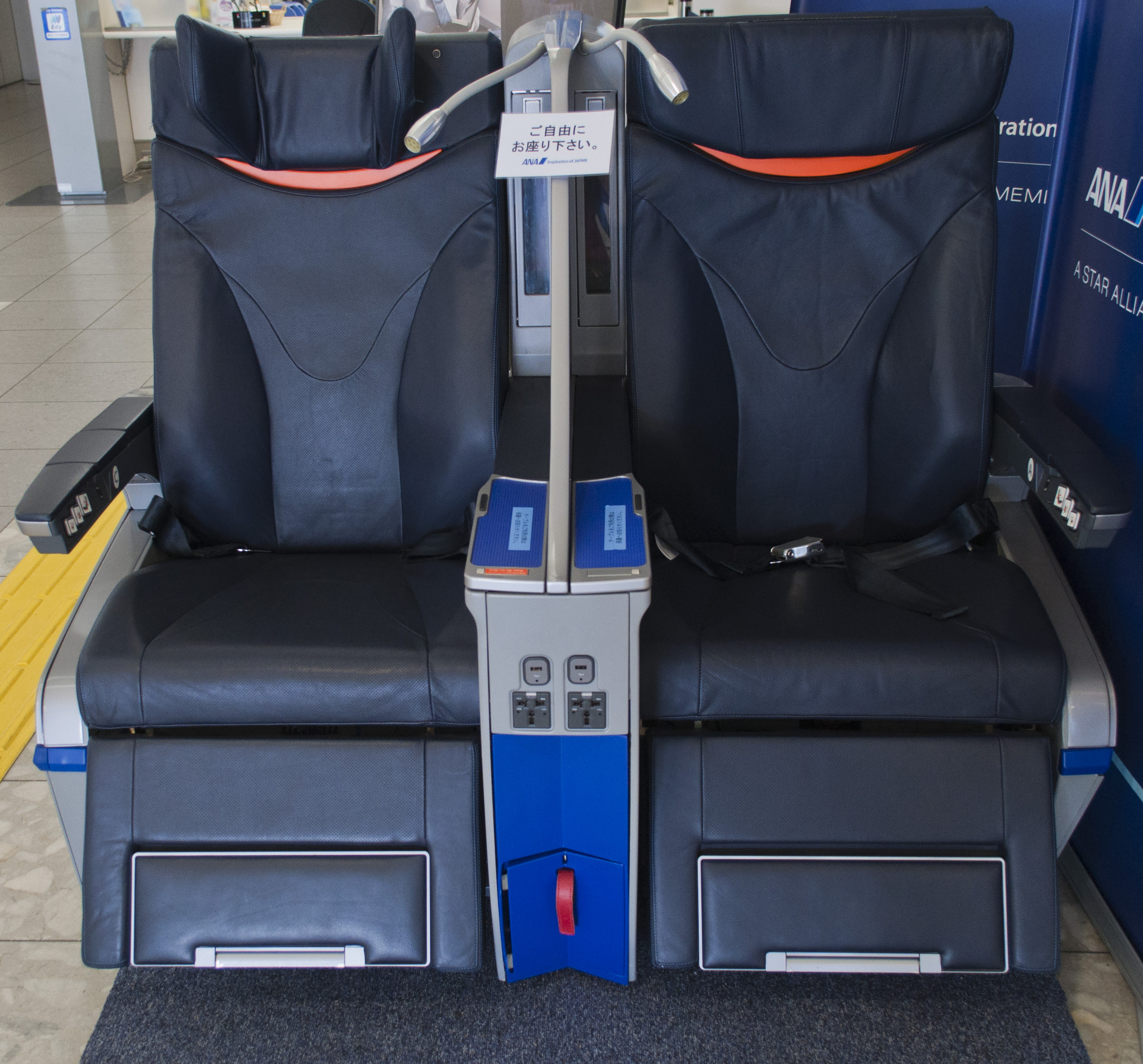 ANA国内線プレミアムクラス座席（2012年以降導入されている新シート）。福岡空港カウンター前にて撮影。